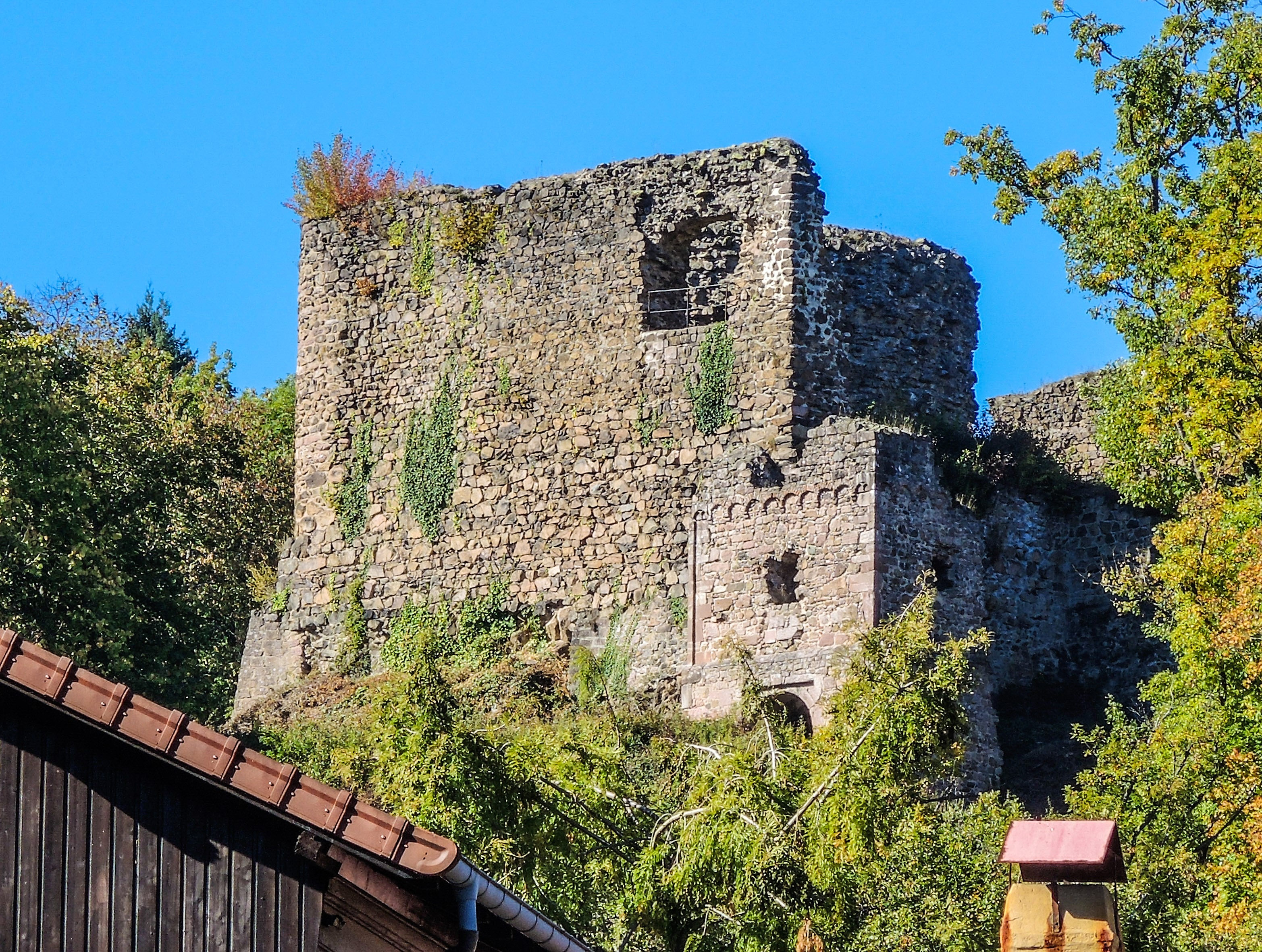 Ruines du château du Hugstein, vues du village de Buhl. Haut-Rhin